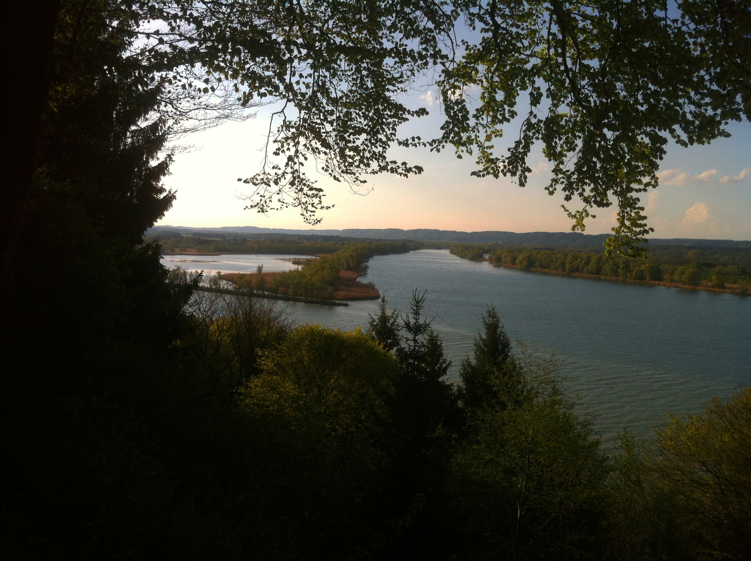 Blick auf den Innspitz von Österreich aus.